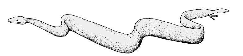 Eupodophis restoration